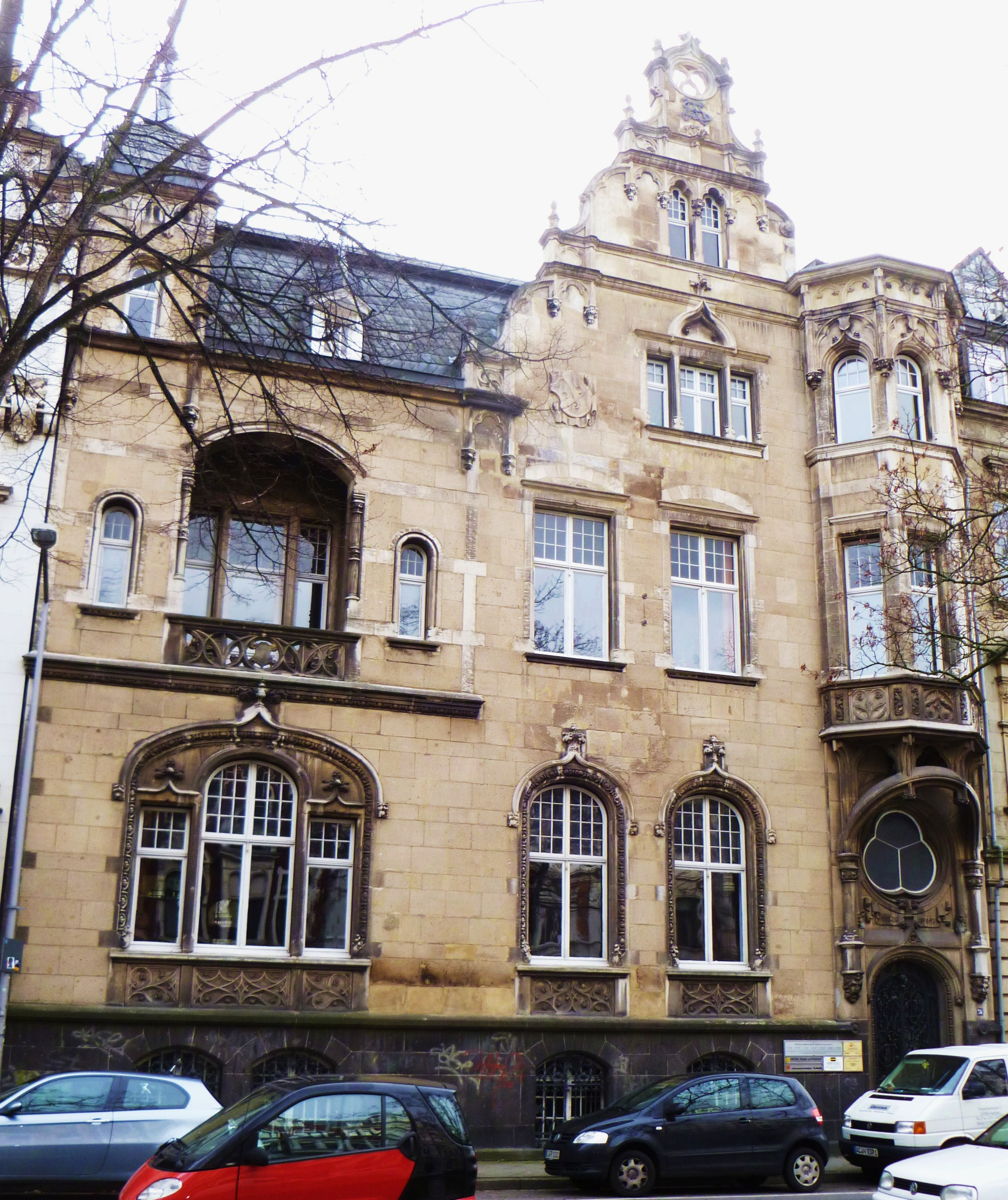 Baudenkmal in Aachen-Burtscheid